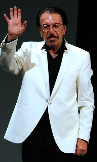 کنسرت ناصر چشم آذر و مانی رهنما